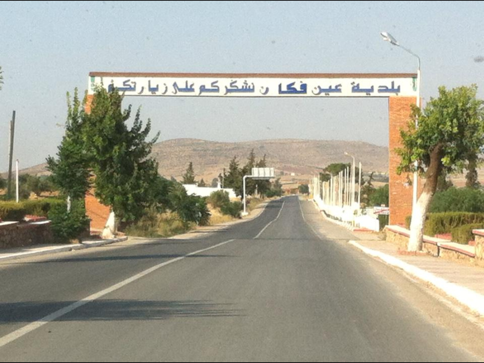 Il y a écrit "La commune de Aïn Fekan vous remercie de votre visite"